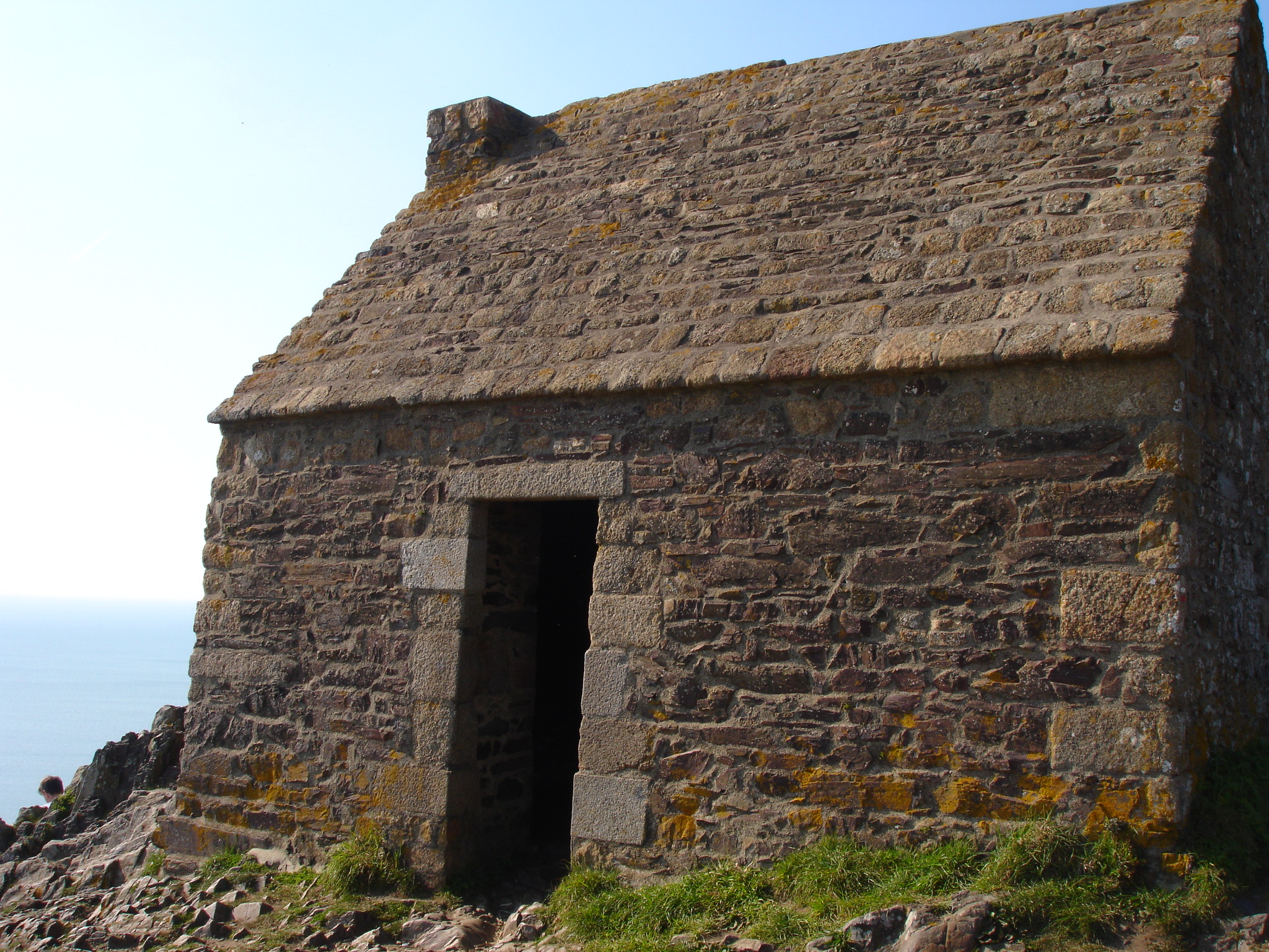 France, Manche (50), Cabane Vauban